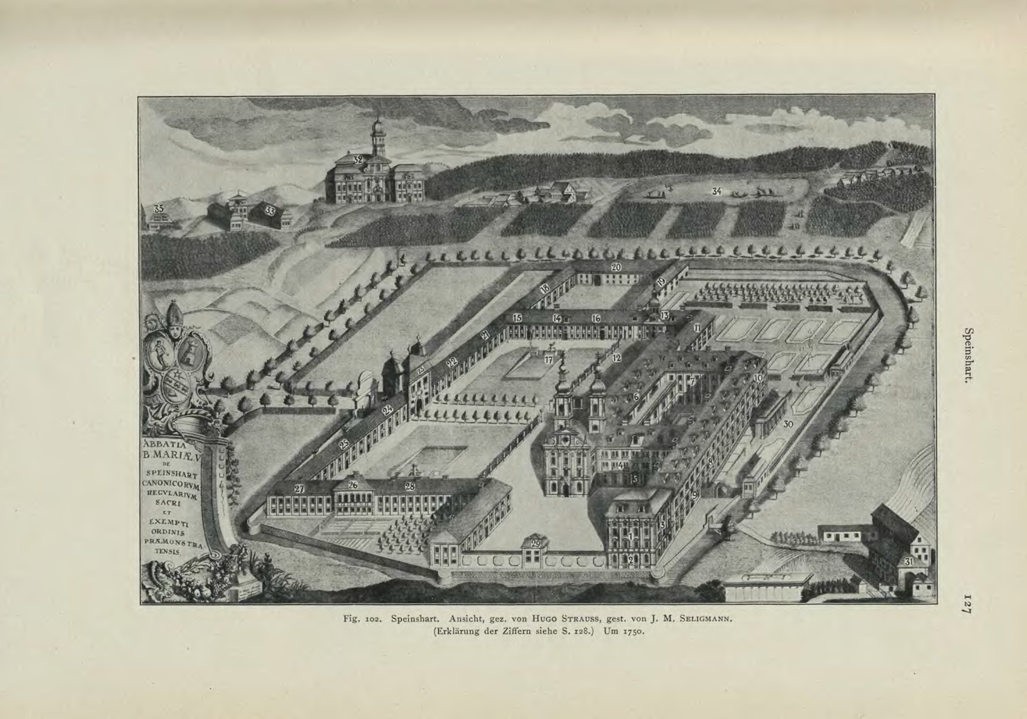 Die Kunstdenkmäler des Königreichs Bayern - Bezirksamt Eschenbach